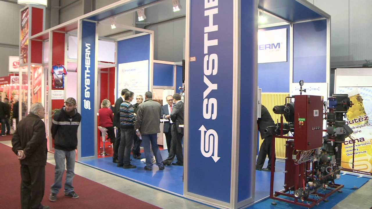 Stavba roku. CZT